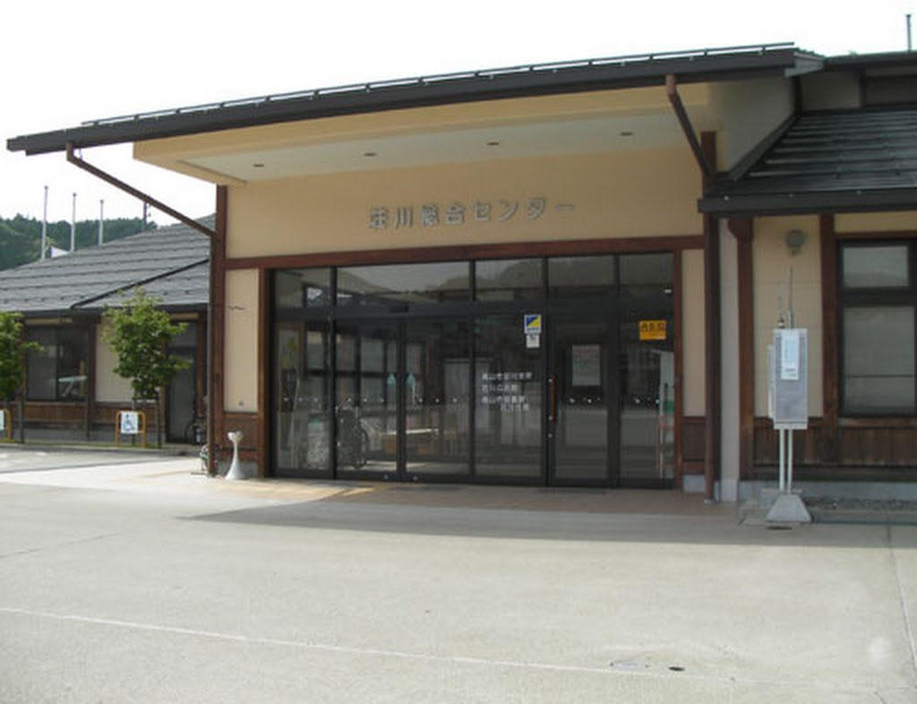 高山市図書館荘川分館。